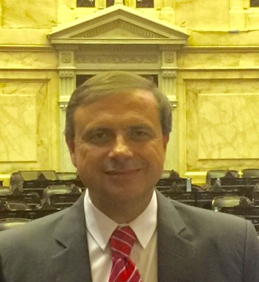 político democratacristiano argentino.